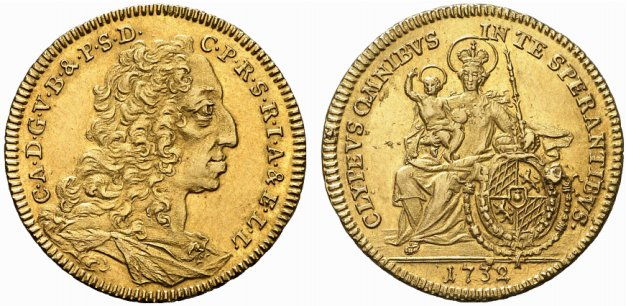 Münze: 1 Karolin, Gold, 9,7g, Bayern, Kurfürst Karl Albert (Kaiser Karl VII., Münzstätte München 1732